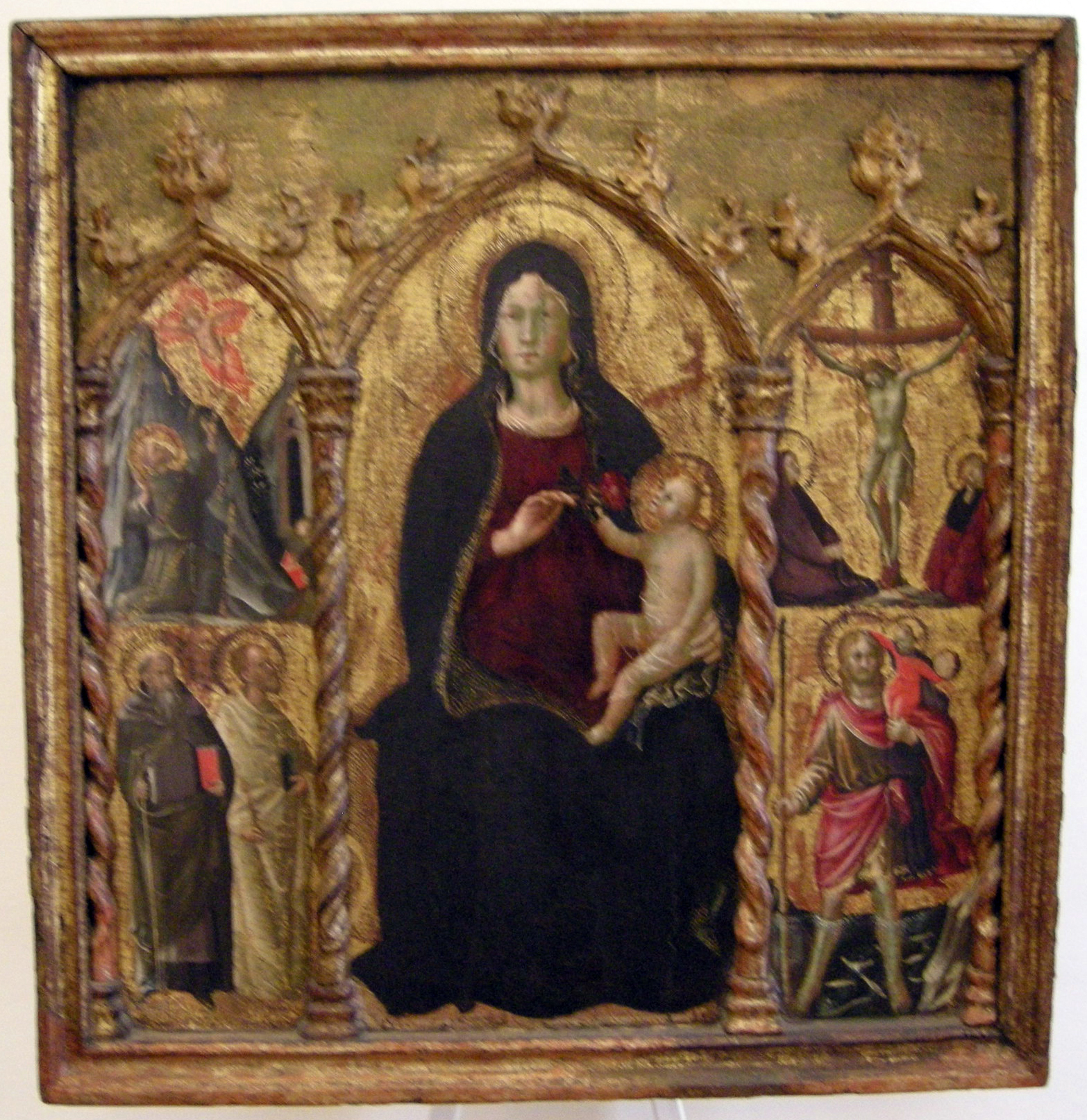 Palazzo Ducale di Urbino - Galleria Nazionale delle Marche - MIBAC This is a photo of a monument which is part of cultural heritage of Italy.